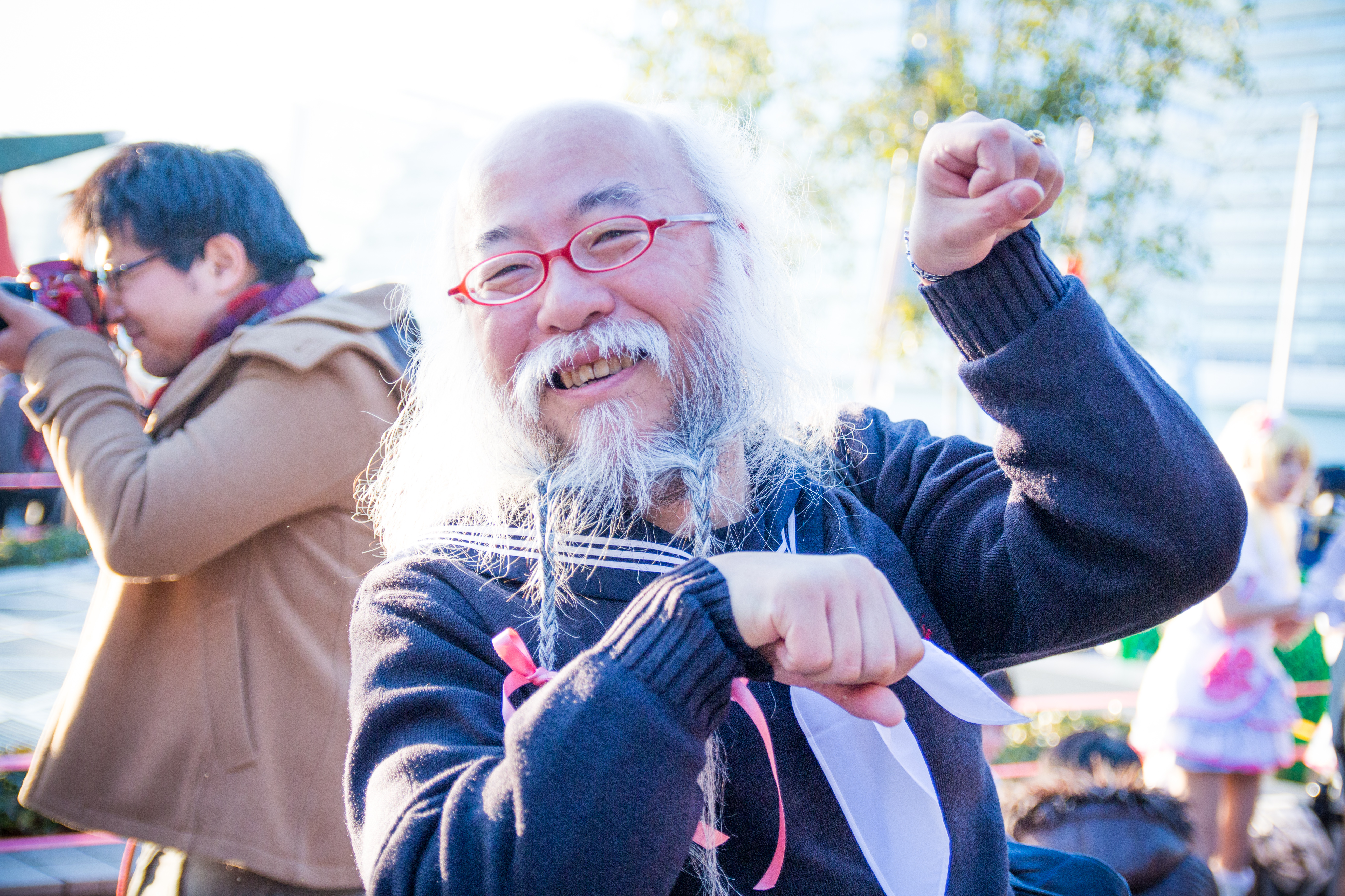 コミックマーケット91 1日目 コスプレイヤー